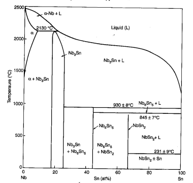 Montre que Nb3Sn est un composé intermétallique